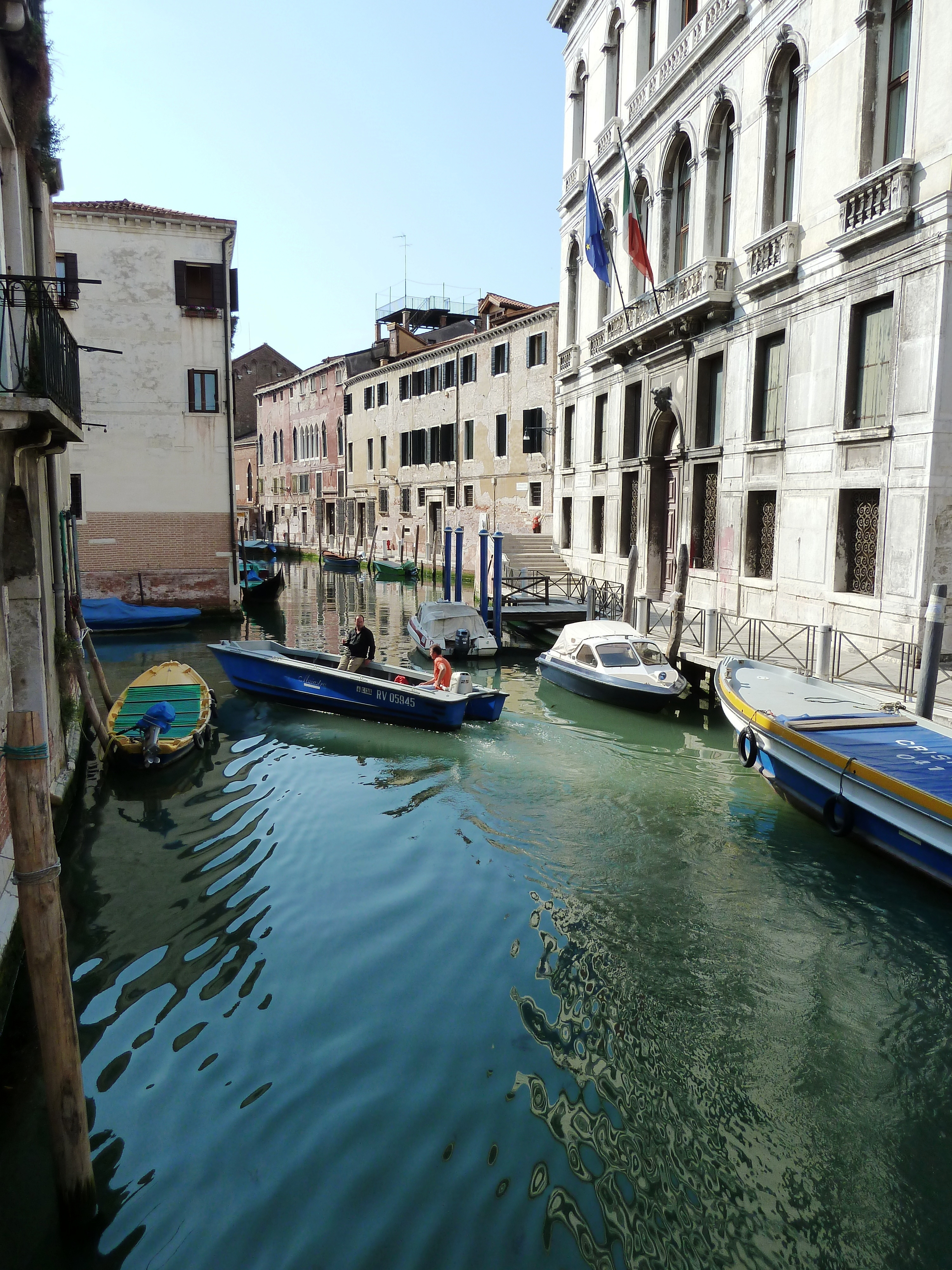 Rio de Santa Fosca (Venice)